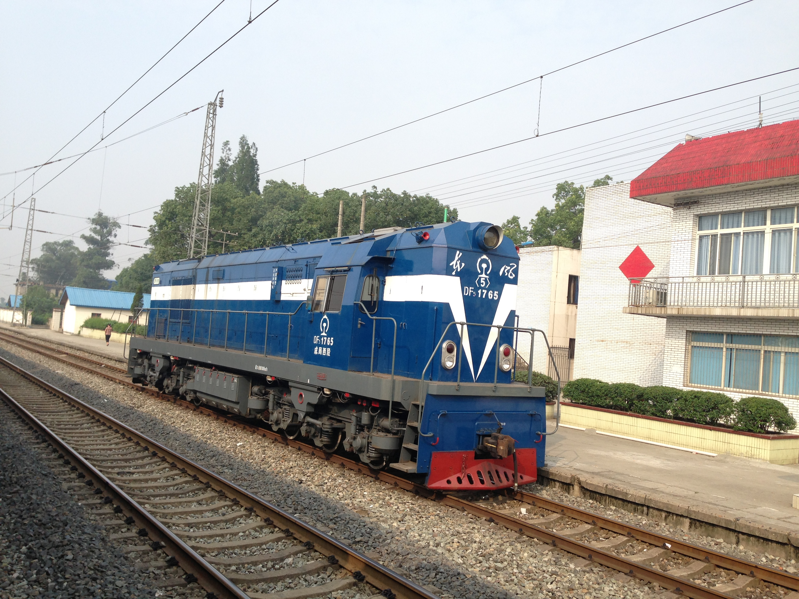 DF5-1765于新津站